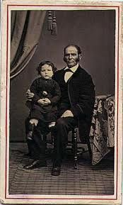 Zacarías Antonio Yanzi guerrero por la Independencia Argentina